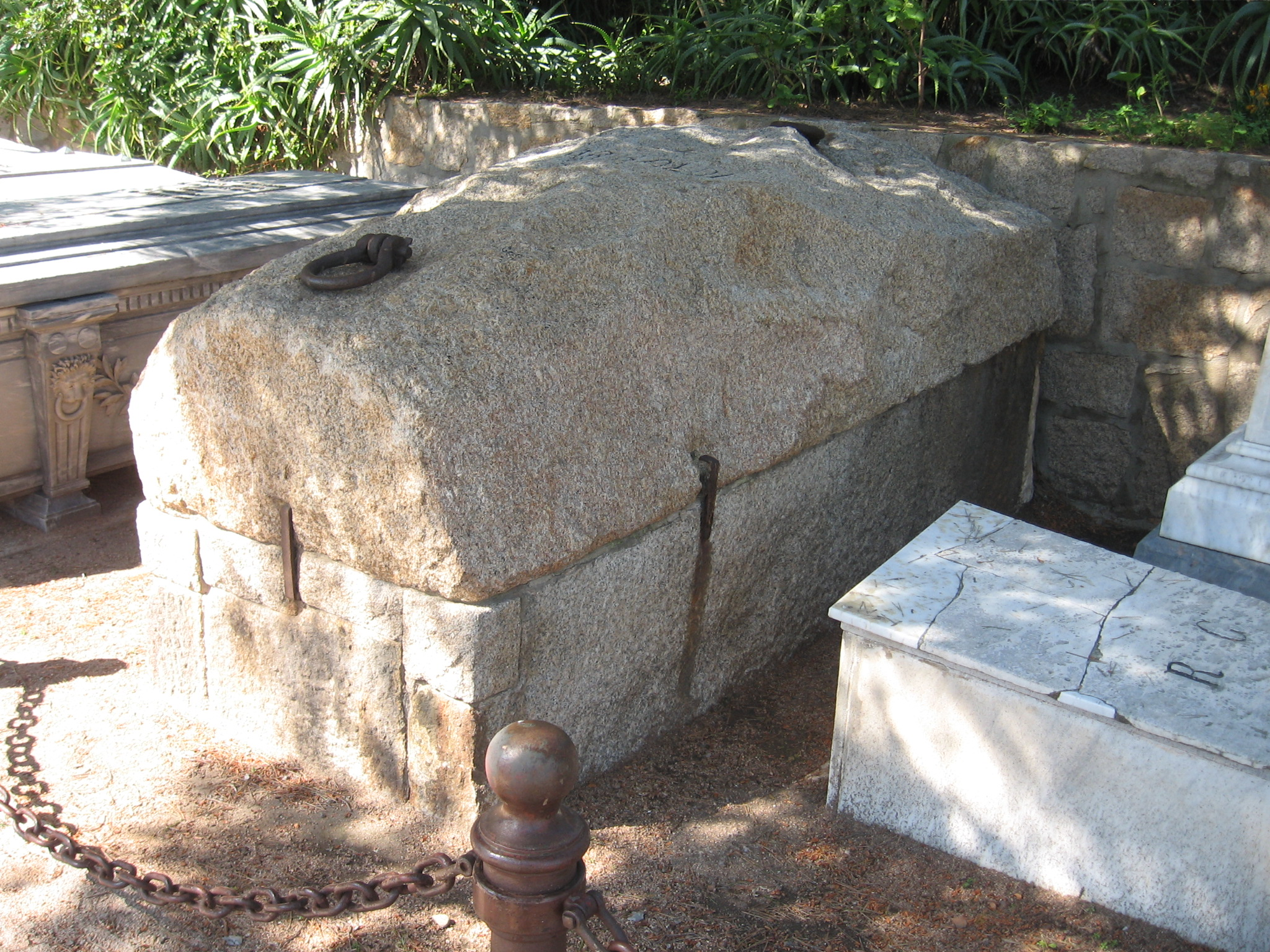 La tomba di Giuseppe Garibaldi, al Museo garibaldino di Caprera.